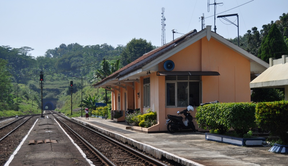 Stasiun Ijo, Kebumen, Jawa Tengah